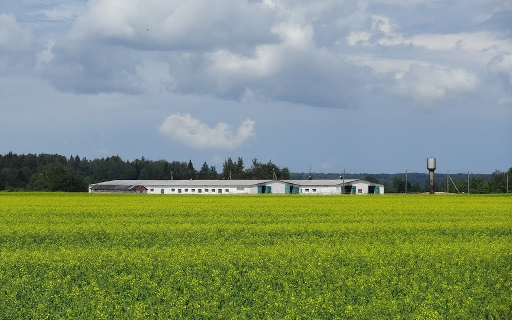 МТФ Малая Ковалевщина